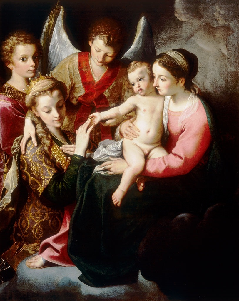 Lo Sposalizio mistico di Santa Caterina di Annibale Carracci è un quadro (olio su tela, cm 160 x 128) che si trova a Napoli nel Museo di Capodimonte (inv. PR 319), facente parte della Collezione Farnese. E' in prestito dal Palazzo Reale di Napoli.